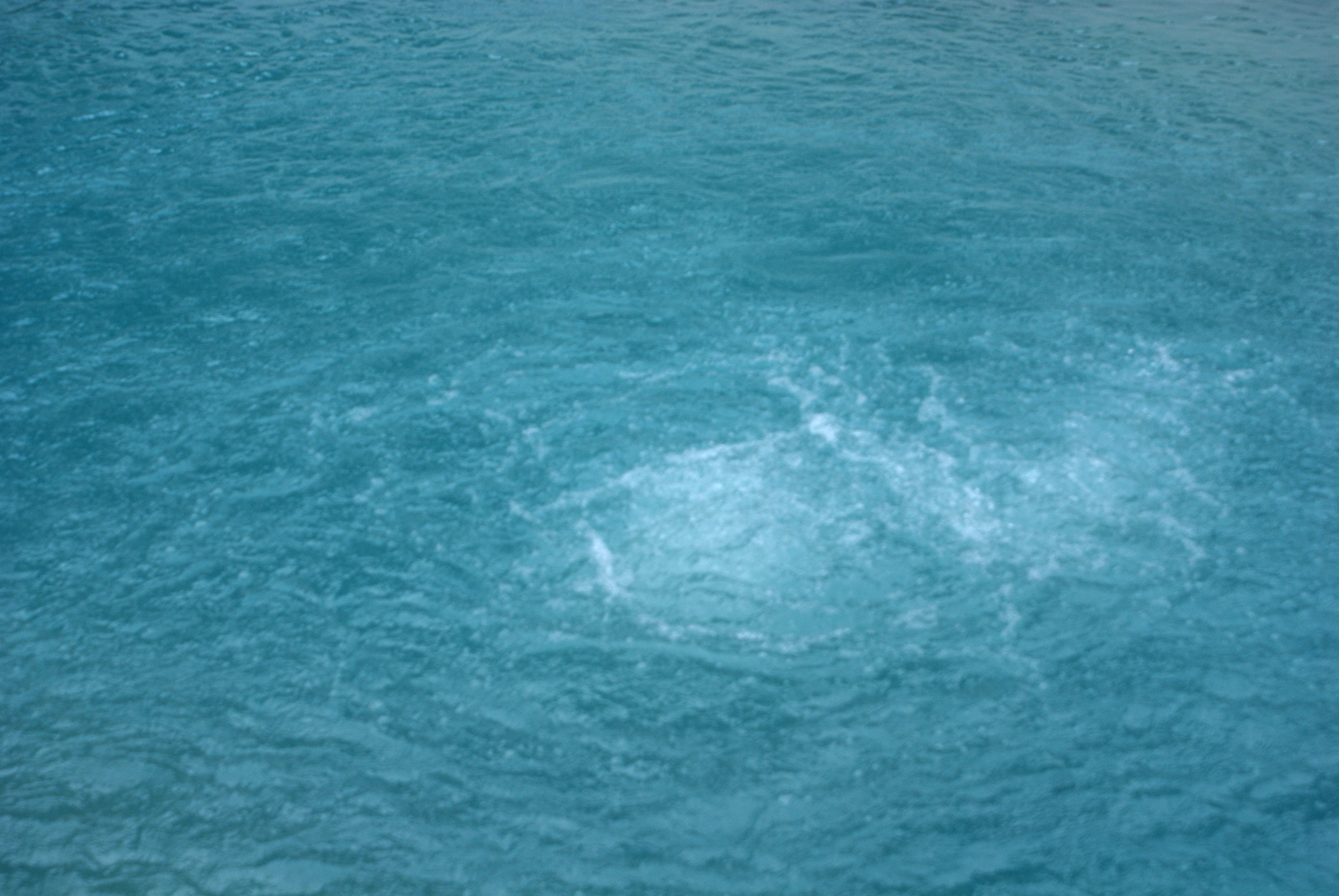 Termas da Ribeira Grande, tanque. Ribeira Grande, ilha de São Miguel, Açores